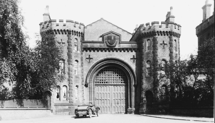 Carte postale de la prison de Birmingham vers 1920